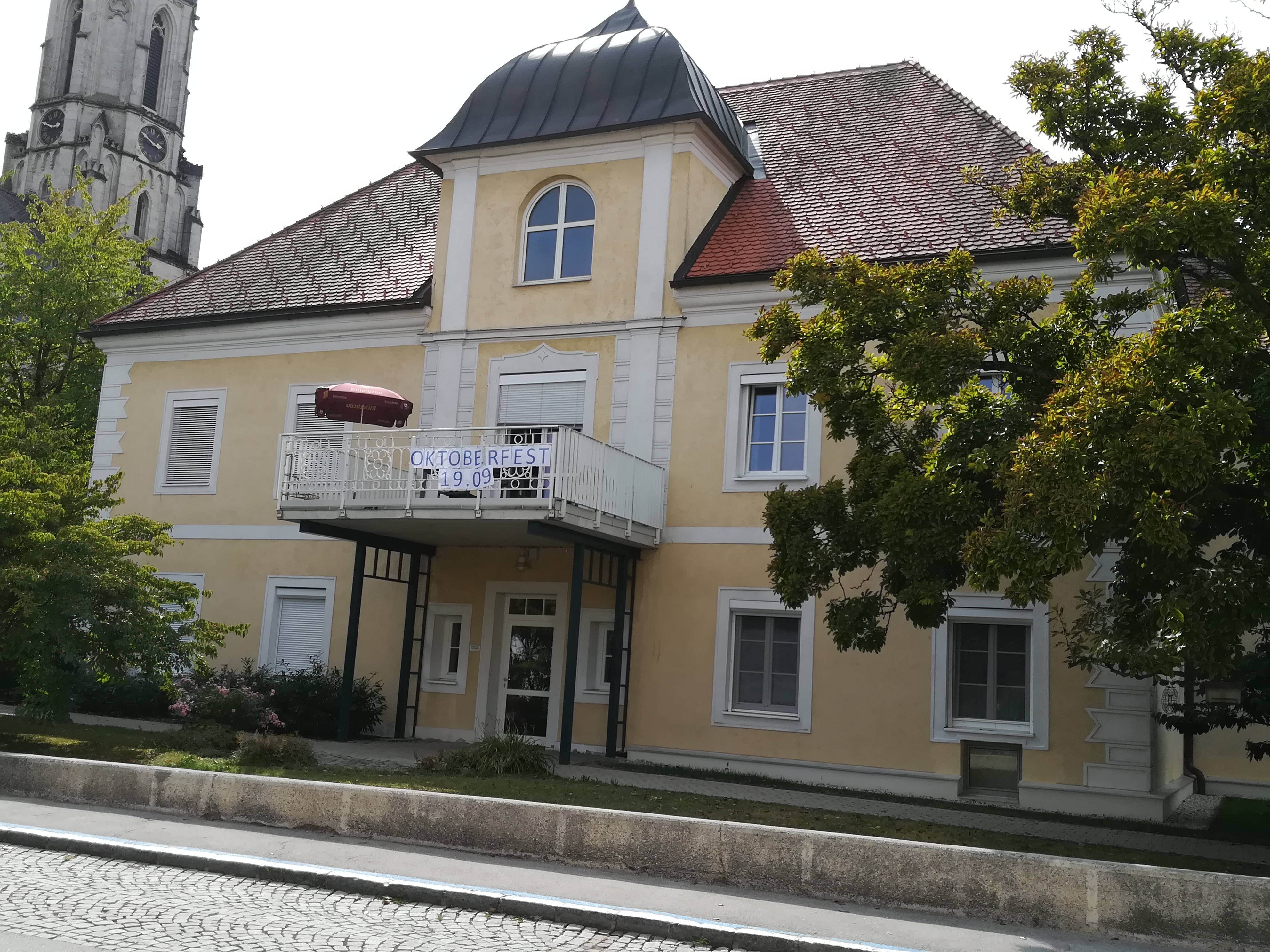 Schloss Hall (Straßenseite)